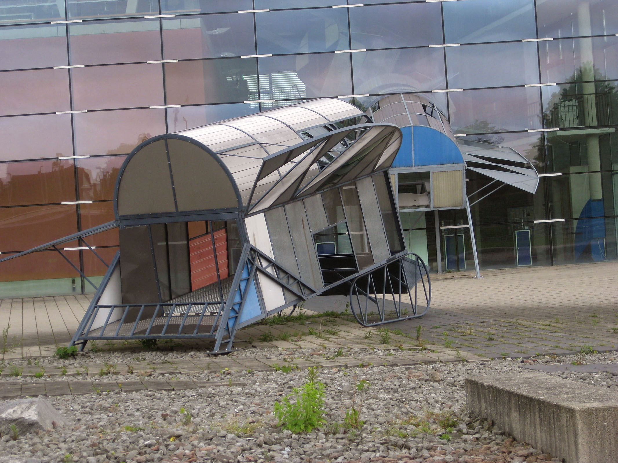 Dennis Oppenheim, Jump and Twist (Detail), 1999, – Deutschland, Baden-Württemberg, Freiburg im Breisgau, Institut der Mikrosystemtechnik, Albert-Ludwigs-Universität, Georges-Köhler-Allee, 106, (FR-Neue Messe)